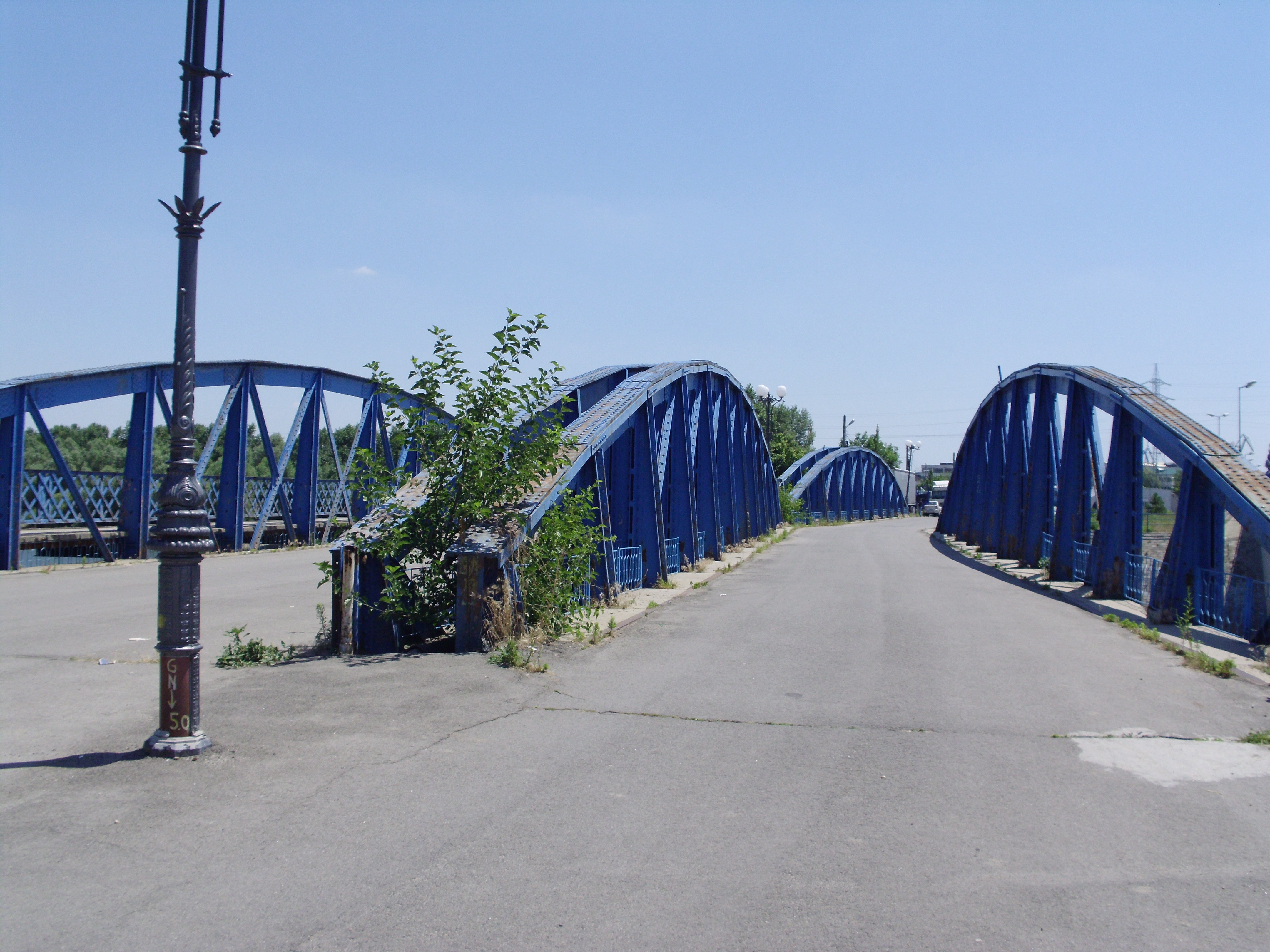 Podul Bizetz